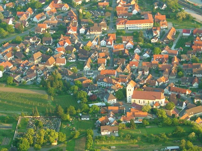 Luftbild von Gottenheim aufgenommen bei einer Ballonfahrt